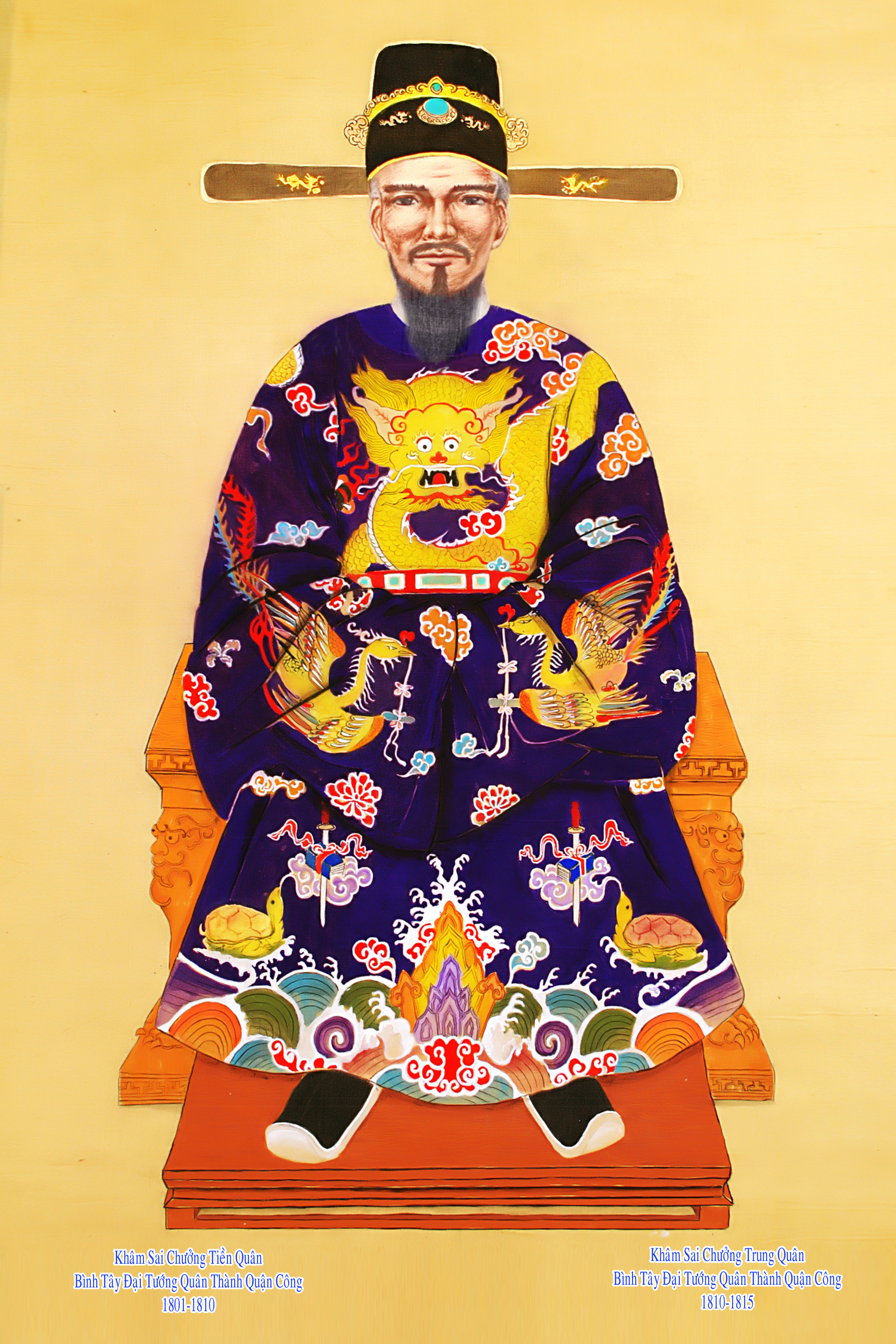 Tranh vẽ Tiền quân Nguyễn Văn Thành (1758 - 1817), một trong những vị khai quốc công thần của nhà Nguyễn